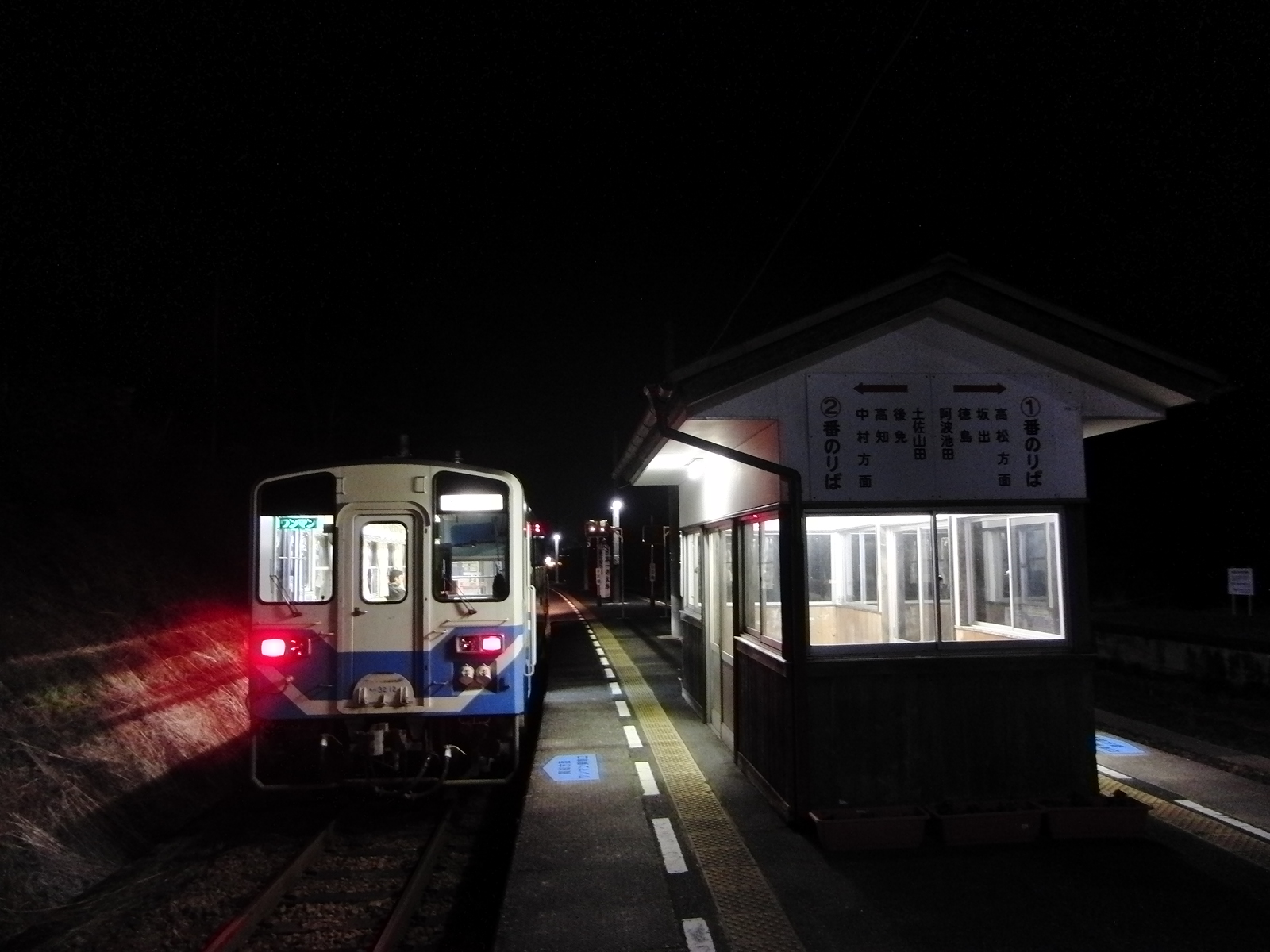 土讃線大杉駅